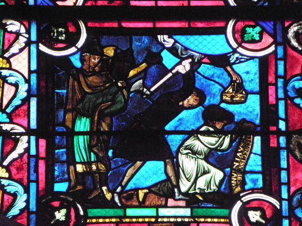 Martyre de Saint-Savinien. Vitrail de la chapelle axiale de la métropole Saint-Étienne de Sens (89).